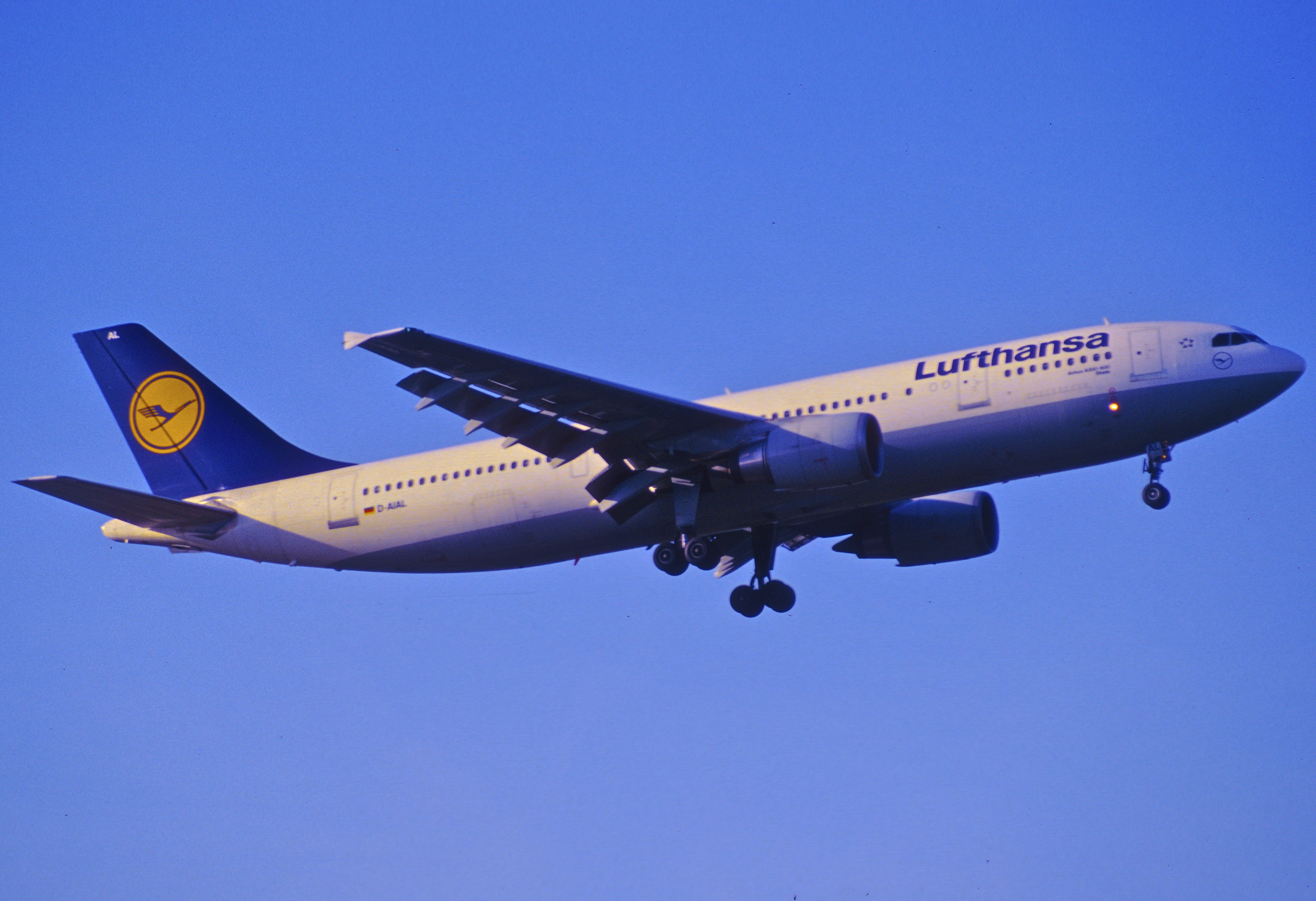 219bw - Lufthansa Airbus A300-600; D-AIAL@LHR;31.03.2003